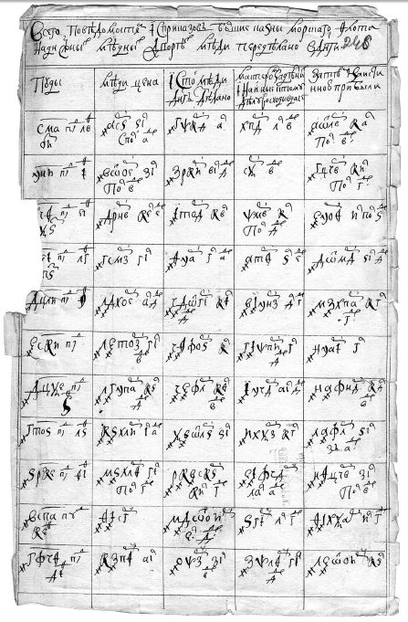 Лист документа о переделе меди в монету (РГАДА)